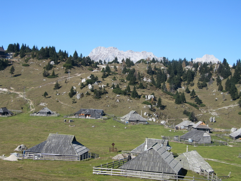 Velika planina